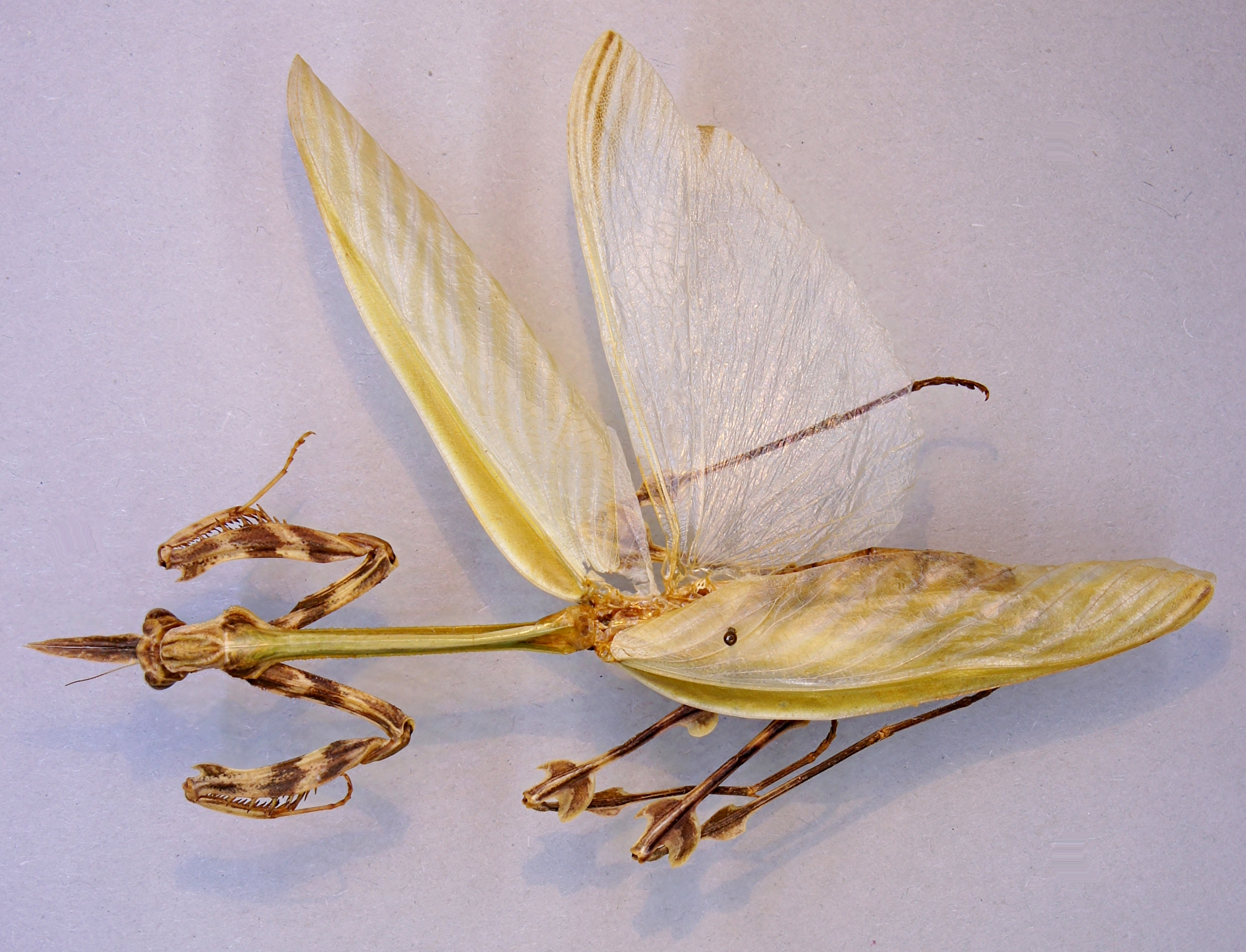 Zoolea lobipes (Oliviér,1792) ♀ Herkunft: Venezuela, Maracay